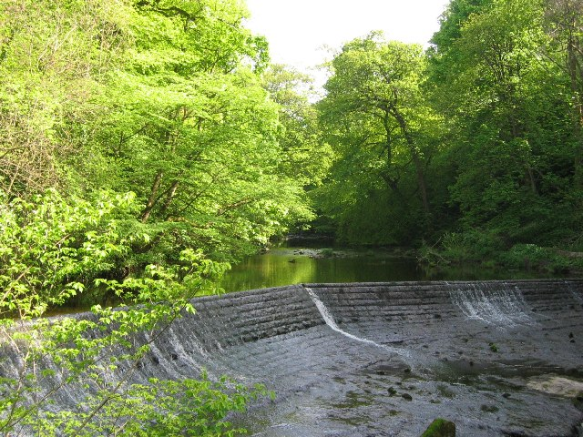 Colinton Dell